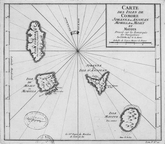 Carte des isles de Comore Johanna ou Anjouan Mohilla ou Moaly et Mayote / dressée sur les remarques des navigateurs par N. Bellin